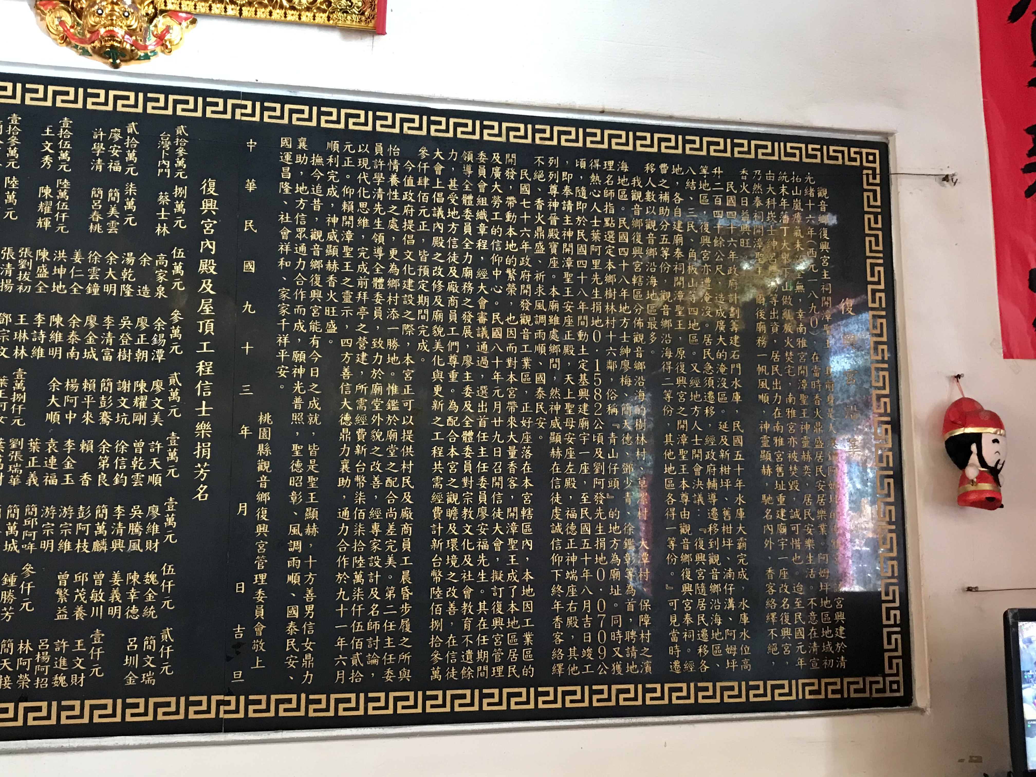 觀音復興宮沿革